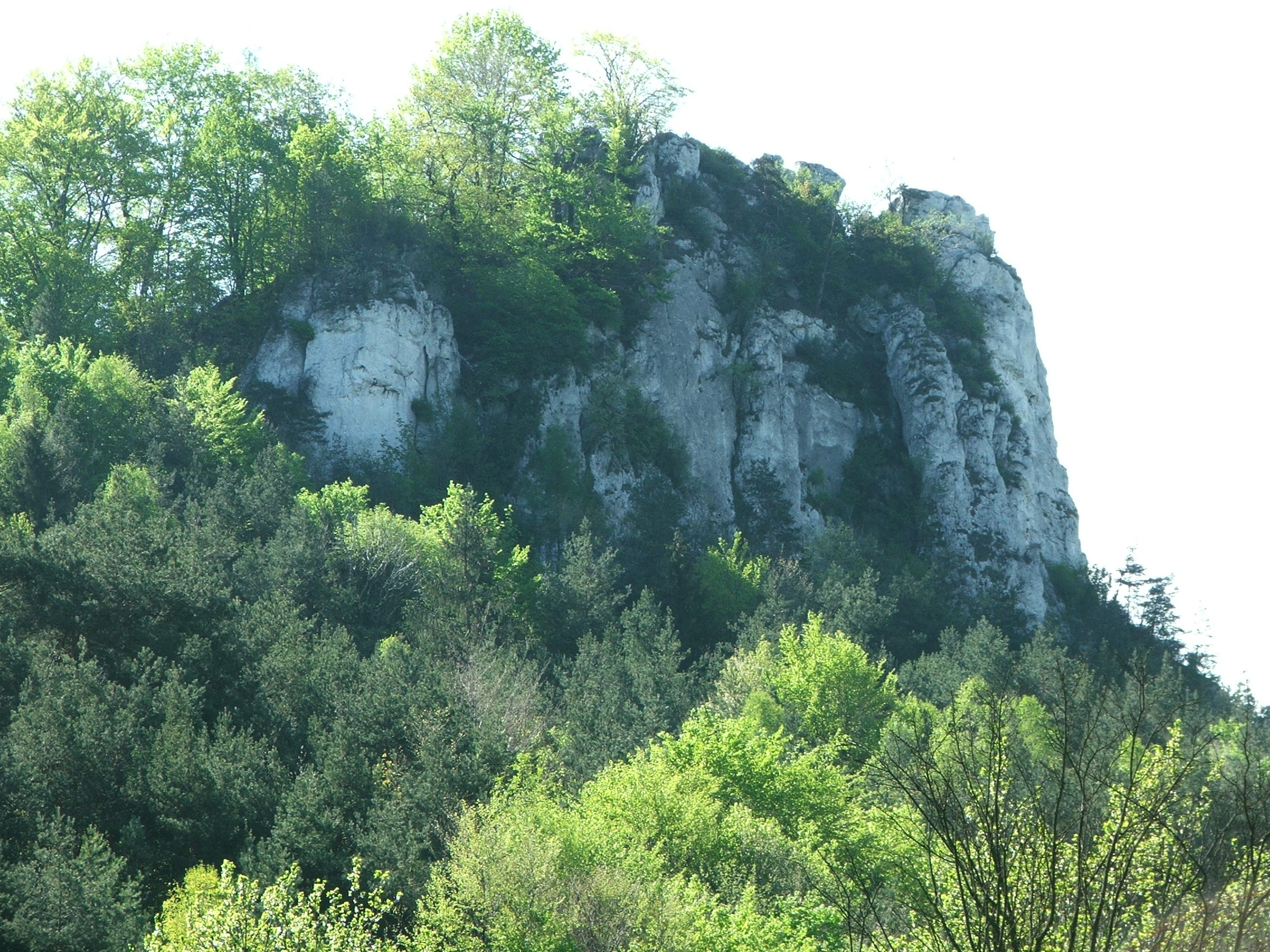 Dolina Szklarki. Skała Brodło (Dolinki Krakowskie)